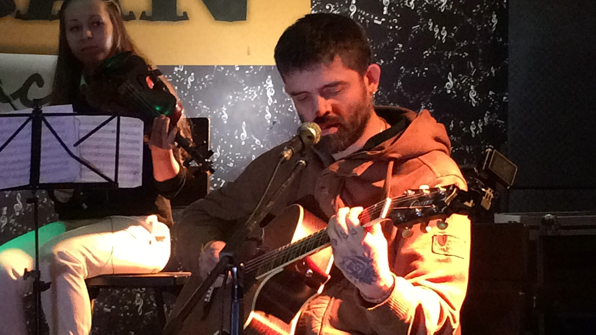 Концерт гурту Пісні Наших Днів (ПНД) у Кривому Розі 4 березня 2017 року.